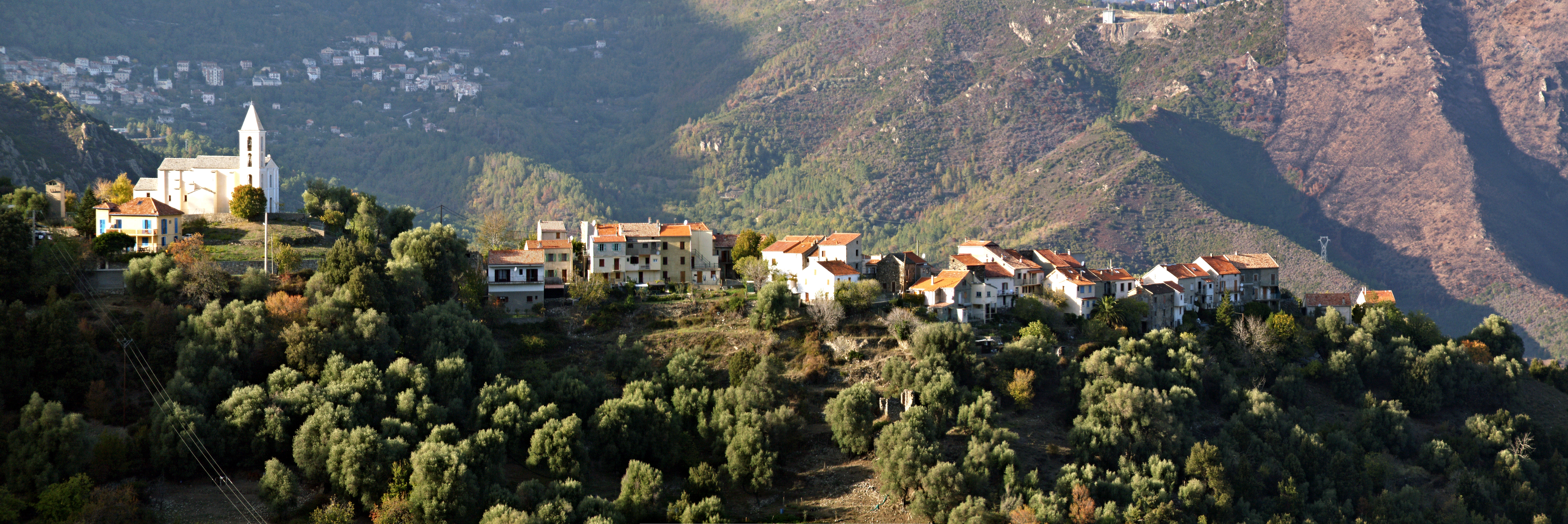 Noceta, Centre Corse (Corse) - Panorama du village de Noceta